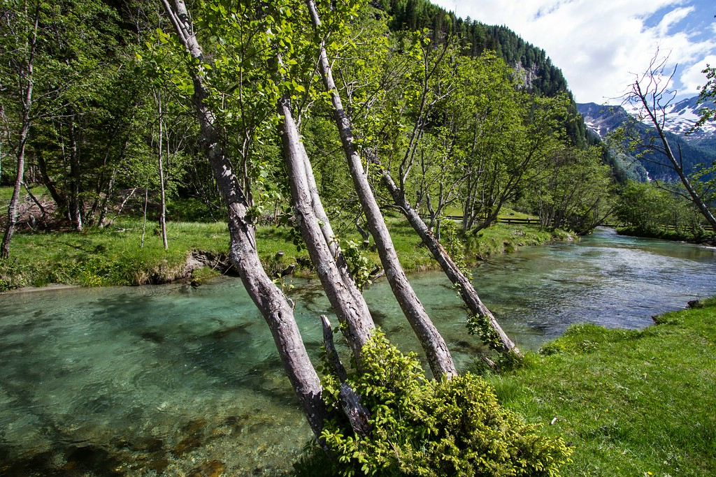 Grau-Erlen am Seebach im gleichnamigen Tal in der Nähe des Stappitzer Sees